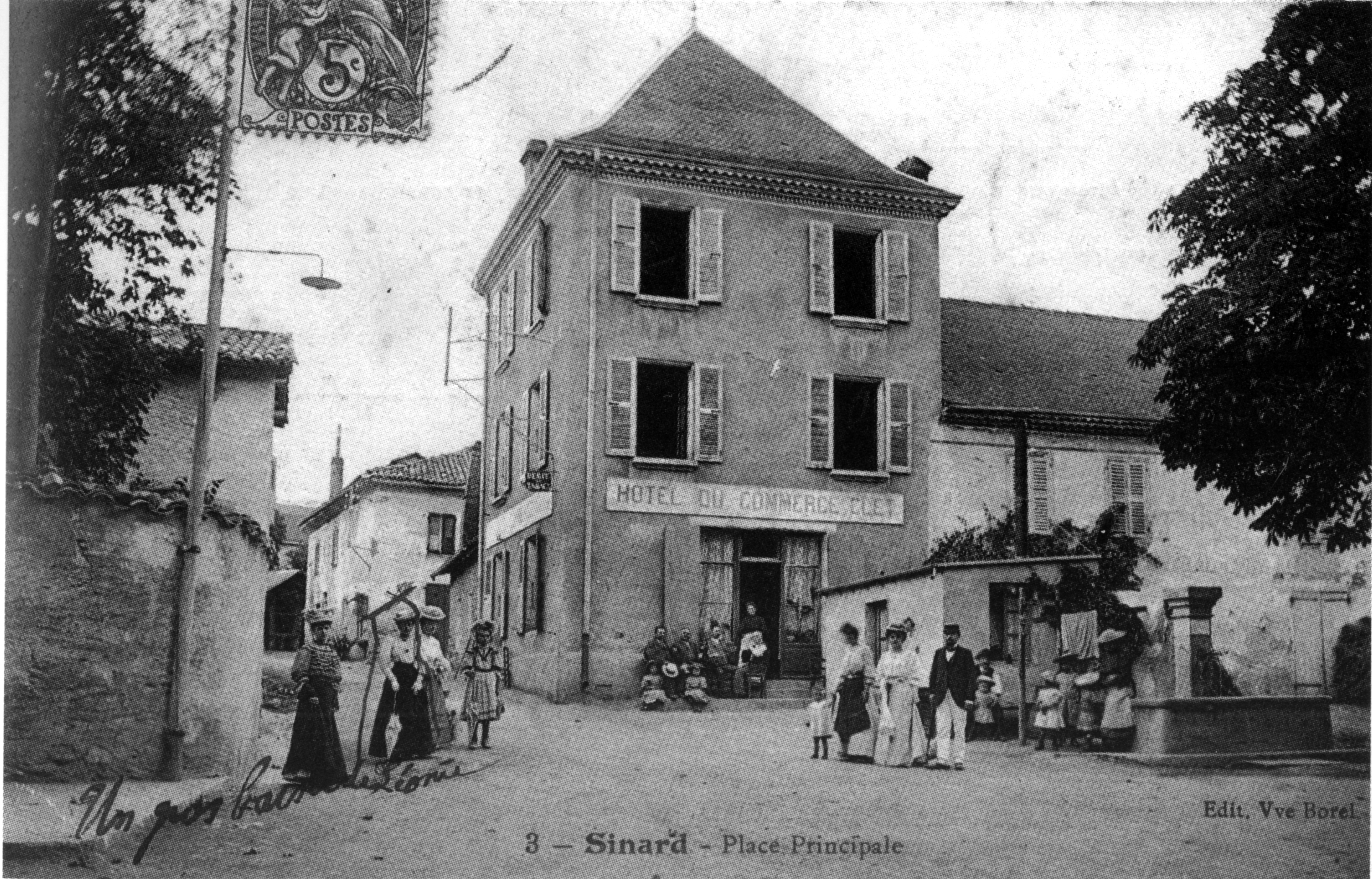 Sinard, place principale, 1906